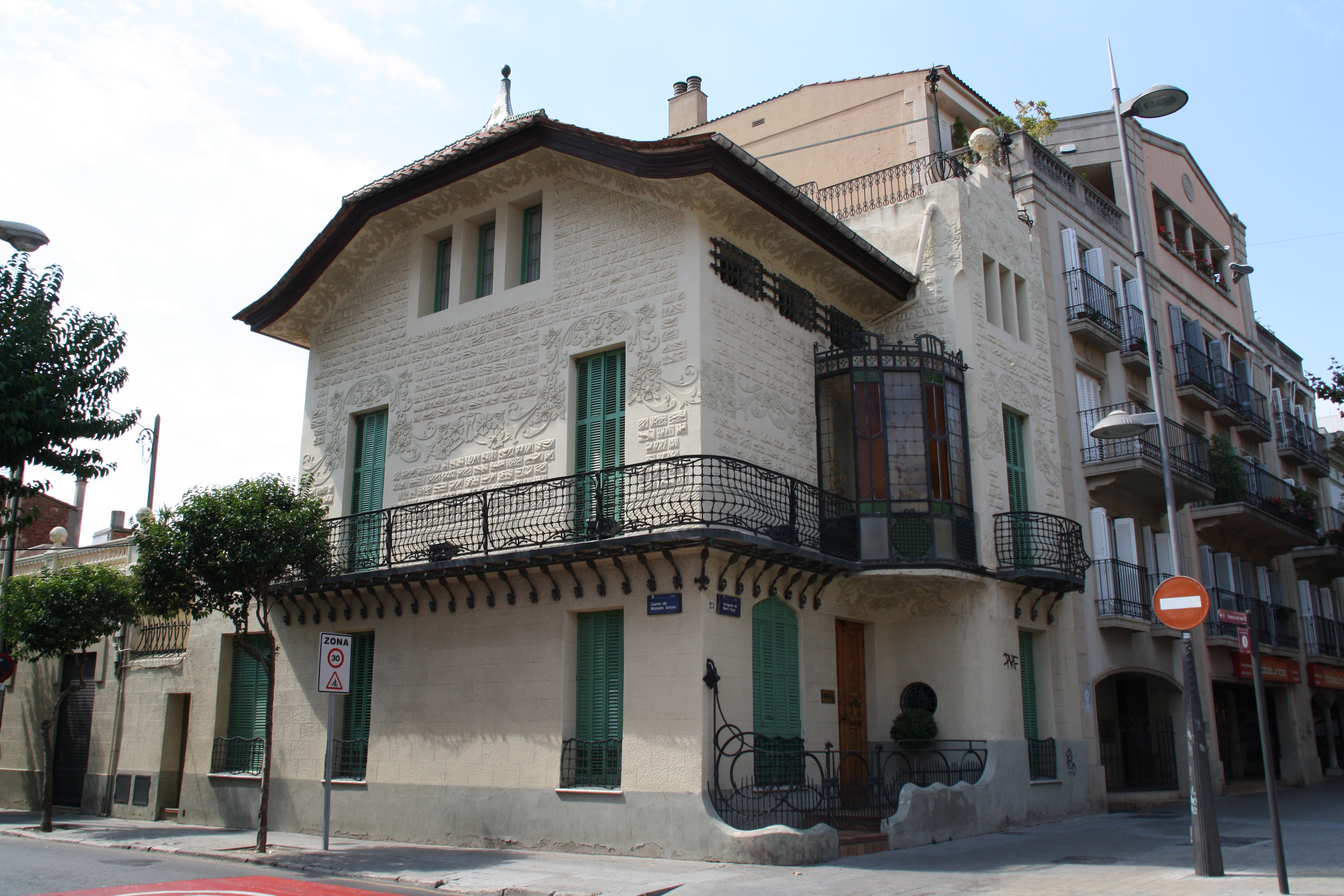 Vista general de la casa Enric Pavillard a Badalona.